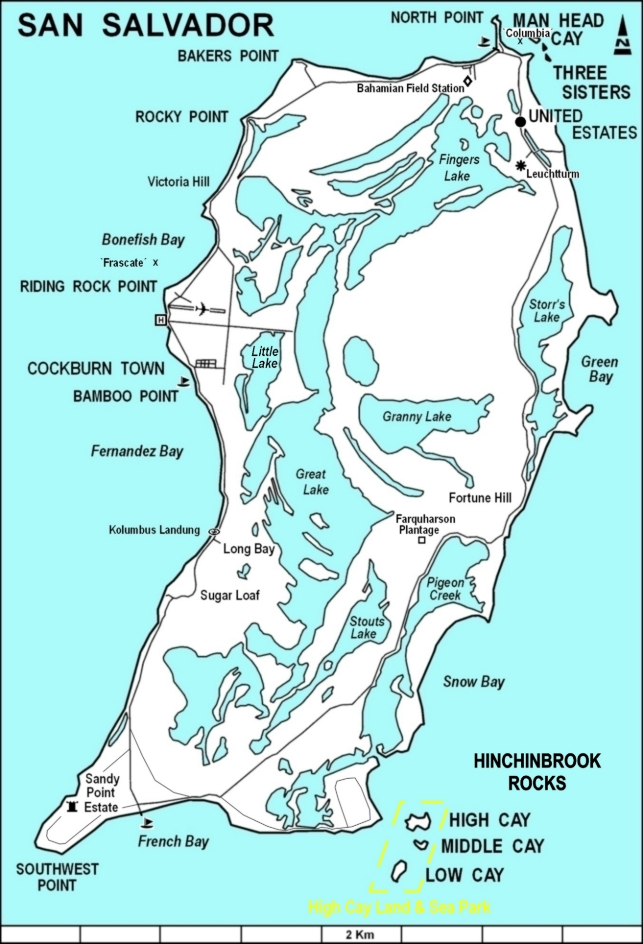 Karte von San Salvador